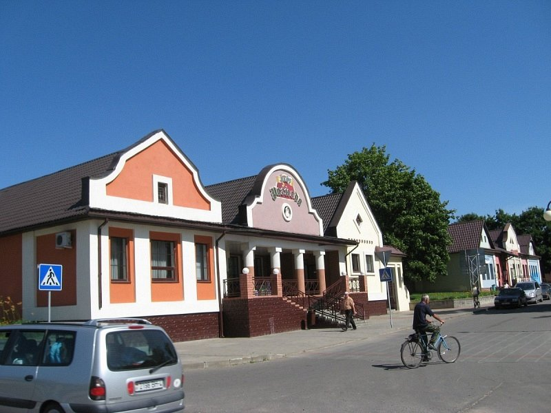 Мір. Забудова галоўнай плошчы